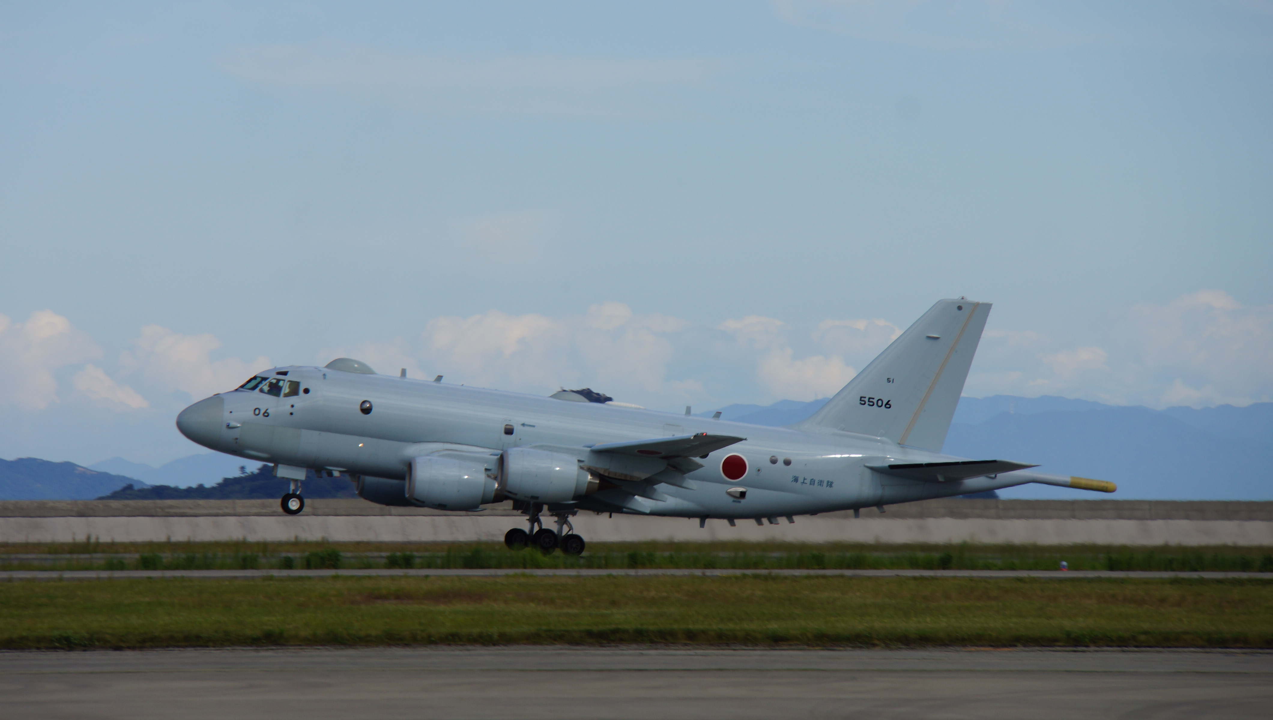 海上自衛隊 P-1哨戒機（5506号機） 離陸時。 14年9月14日 岩国航空基地にて。